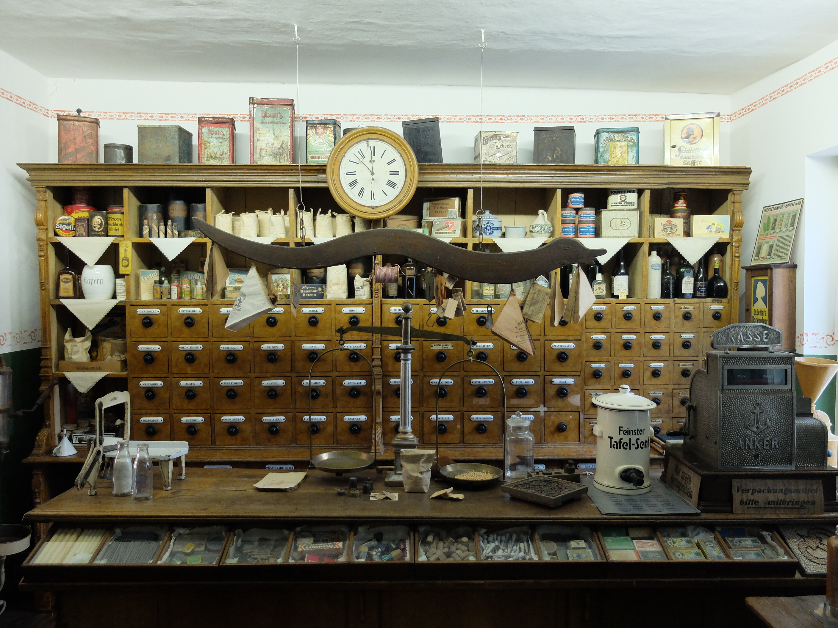 Laden im Stadt- und Regionalmuseum Perleberg.